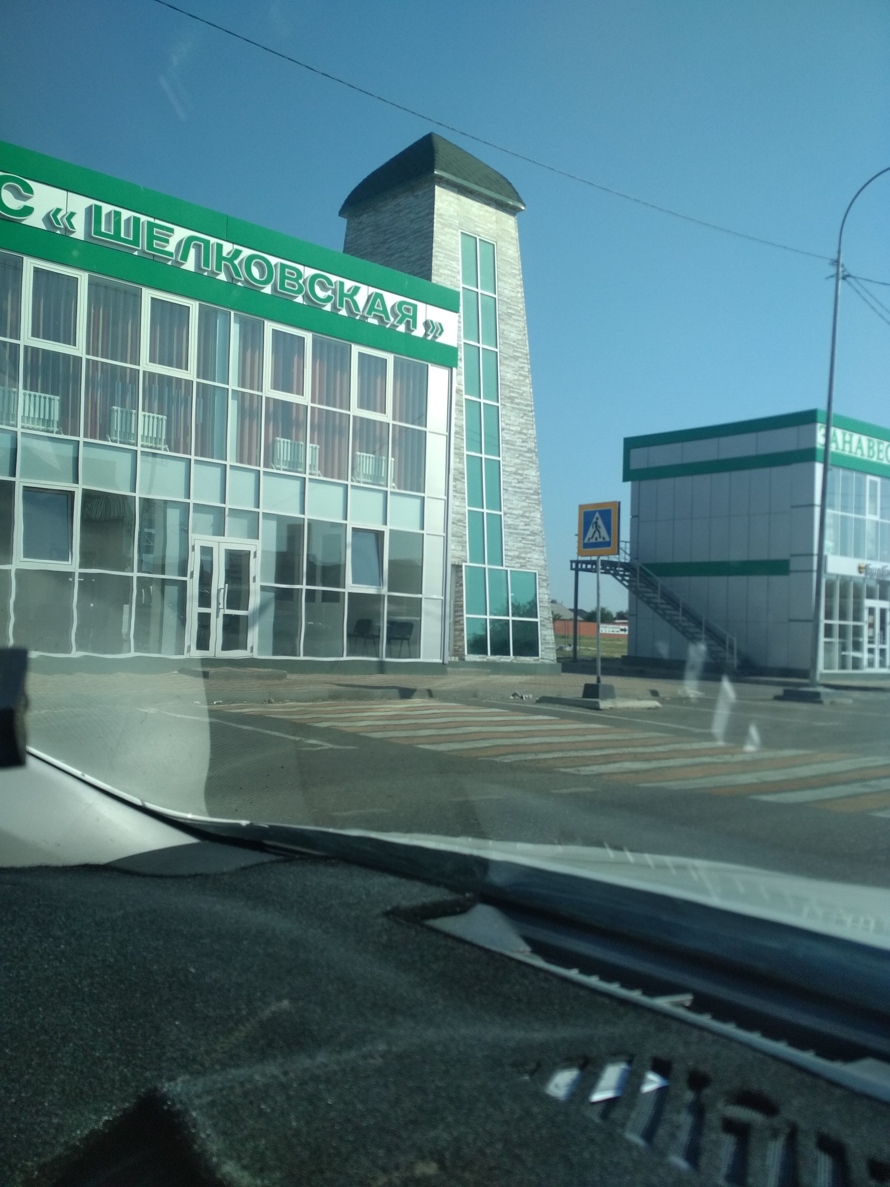 Нохчийн: Шелковскера автостанци